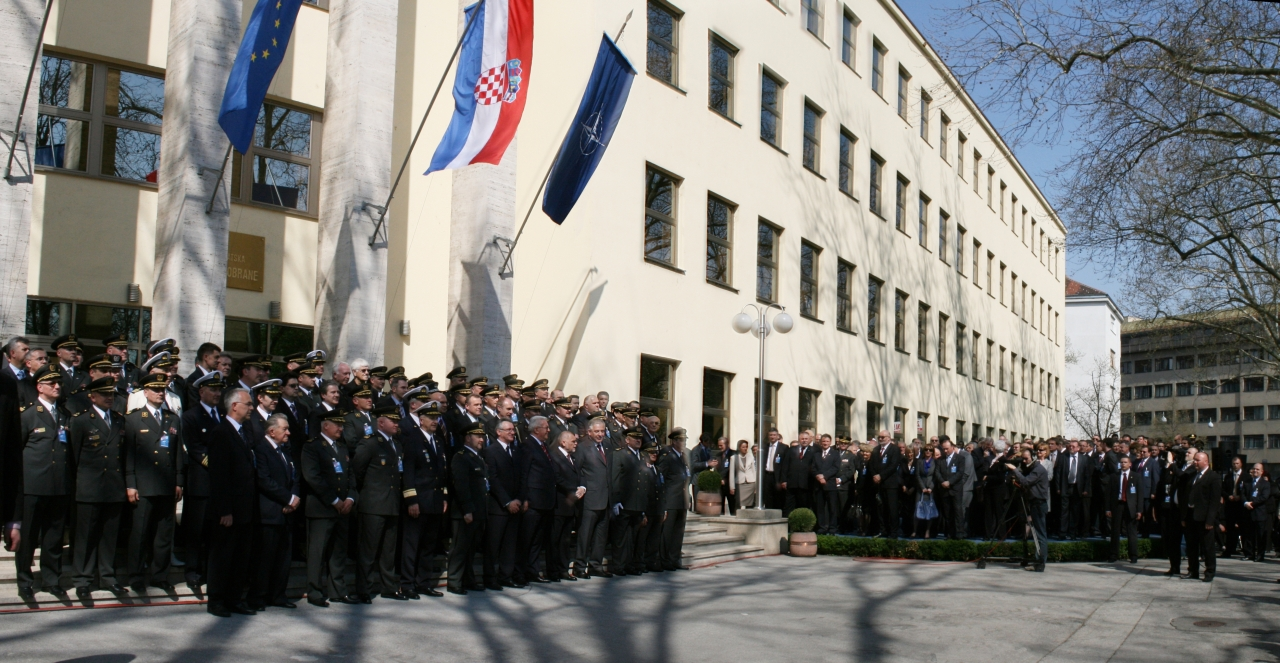 Svečanost podizanja NATO-ve zastave ispred zgrade MORH-a u Zagrebu.